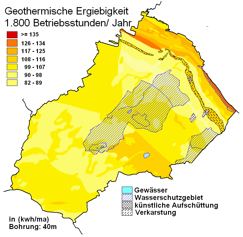 geothermische Karte Halle (Westfalen)